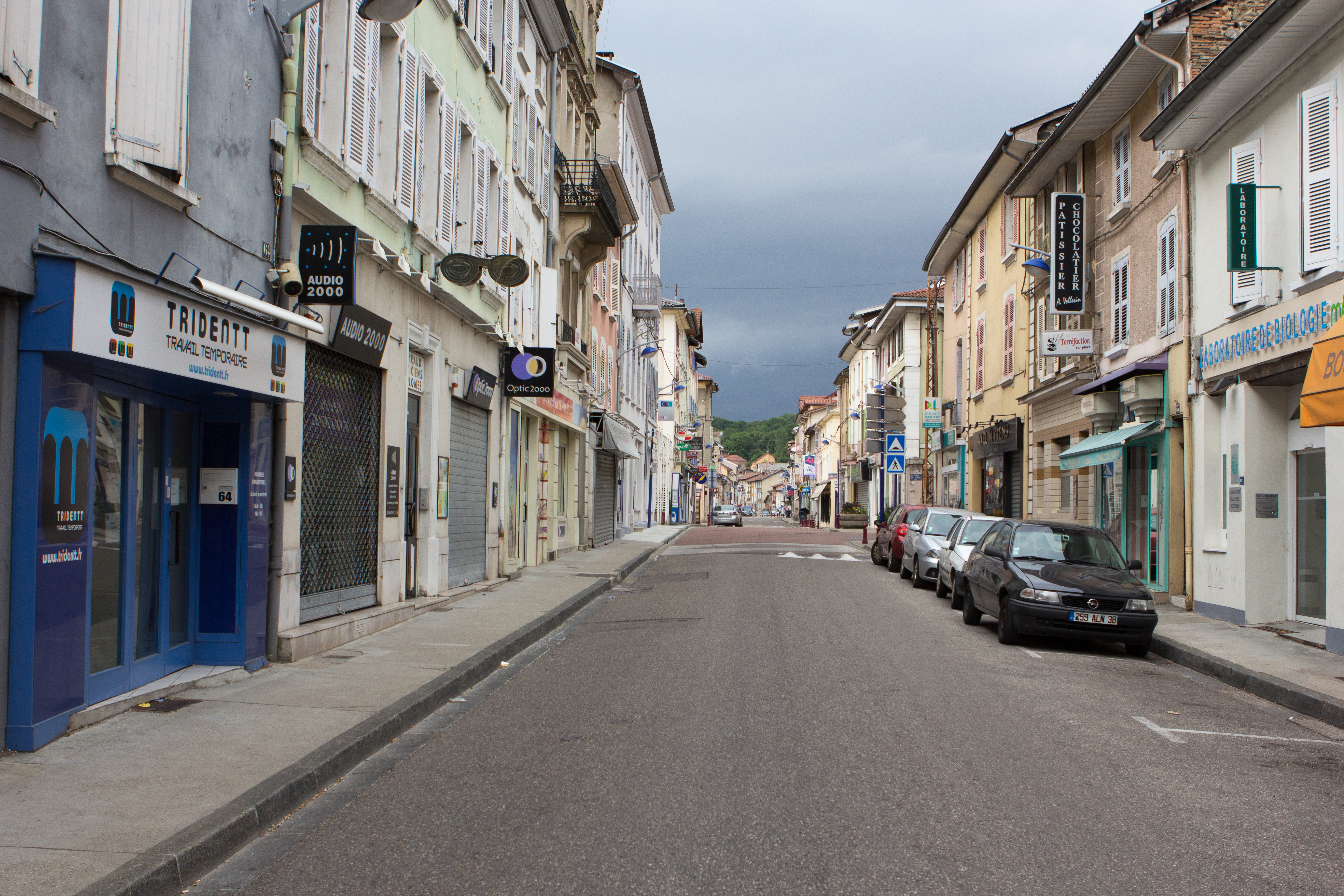 Rue de la République / Rives, Isère, France